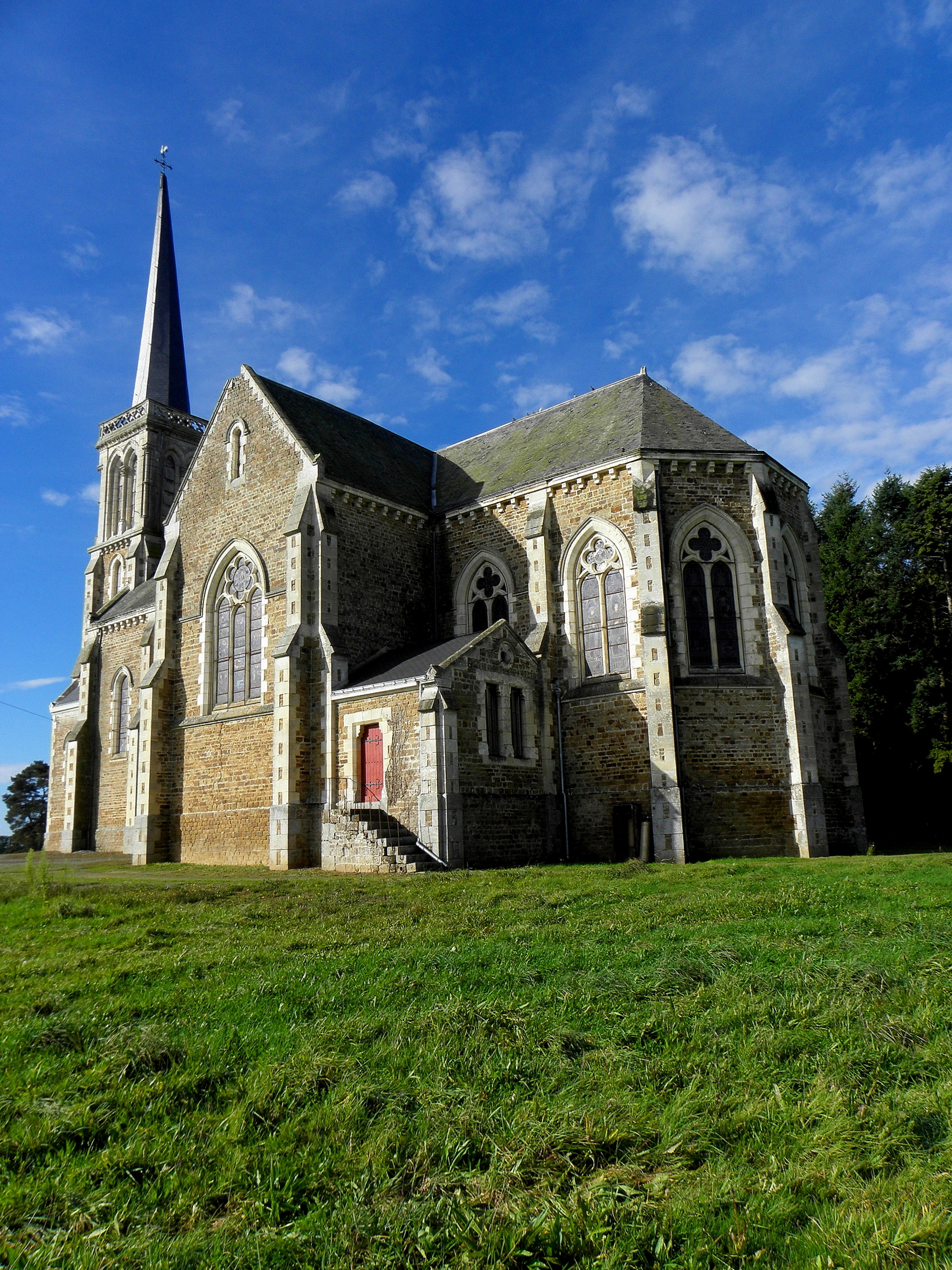 L'église Notre-Dame-de-l'Assomption, lieudit Mégaudais, commune de Saint-Pierre-des-Landes (53). Chevet et flanc est.